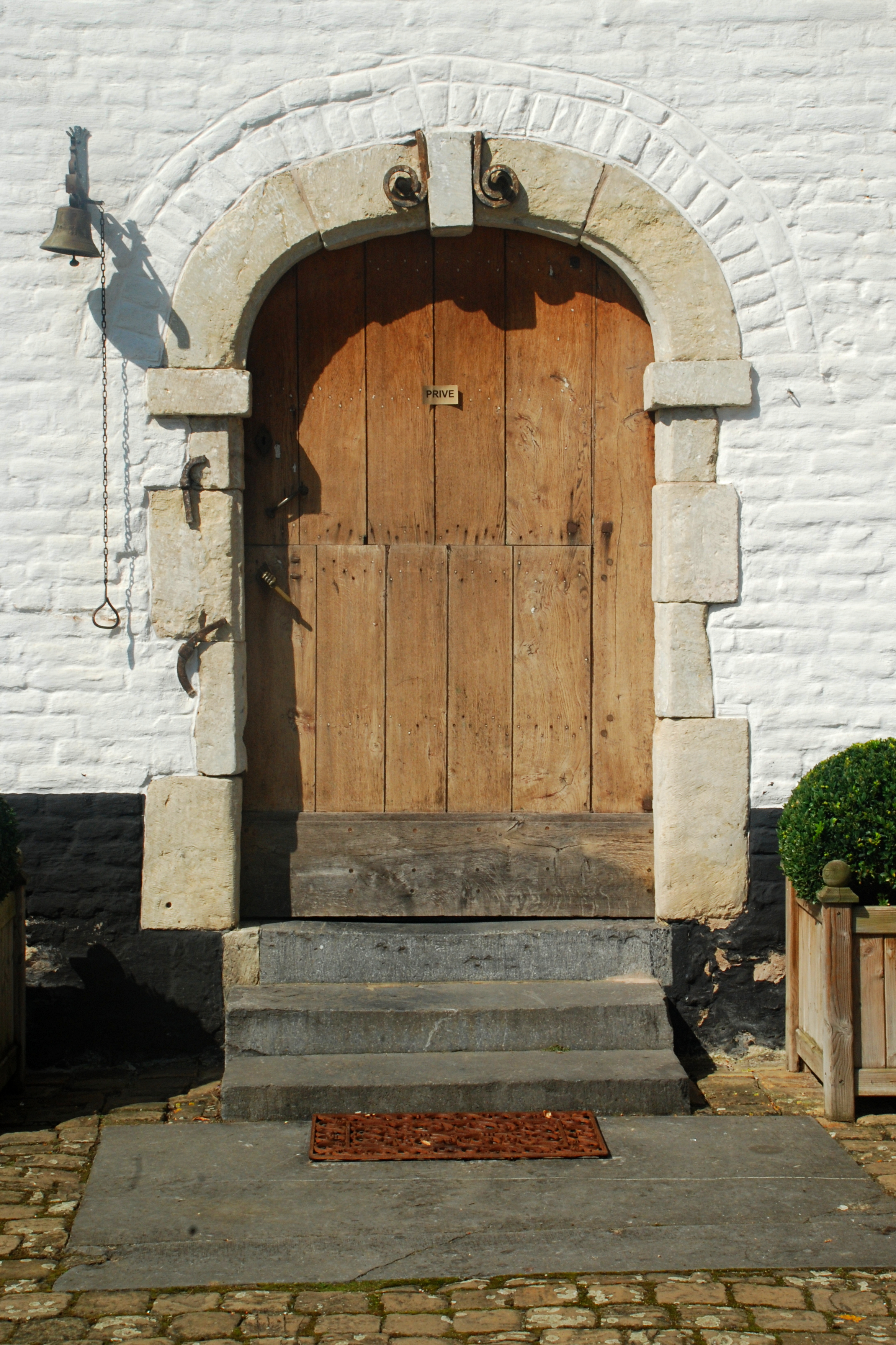 Belgique - Brabant wallon - Court-Saint-Étienne - Ferme de Beaurieux